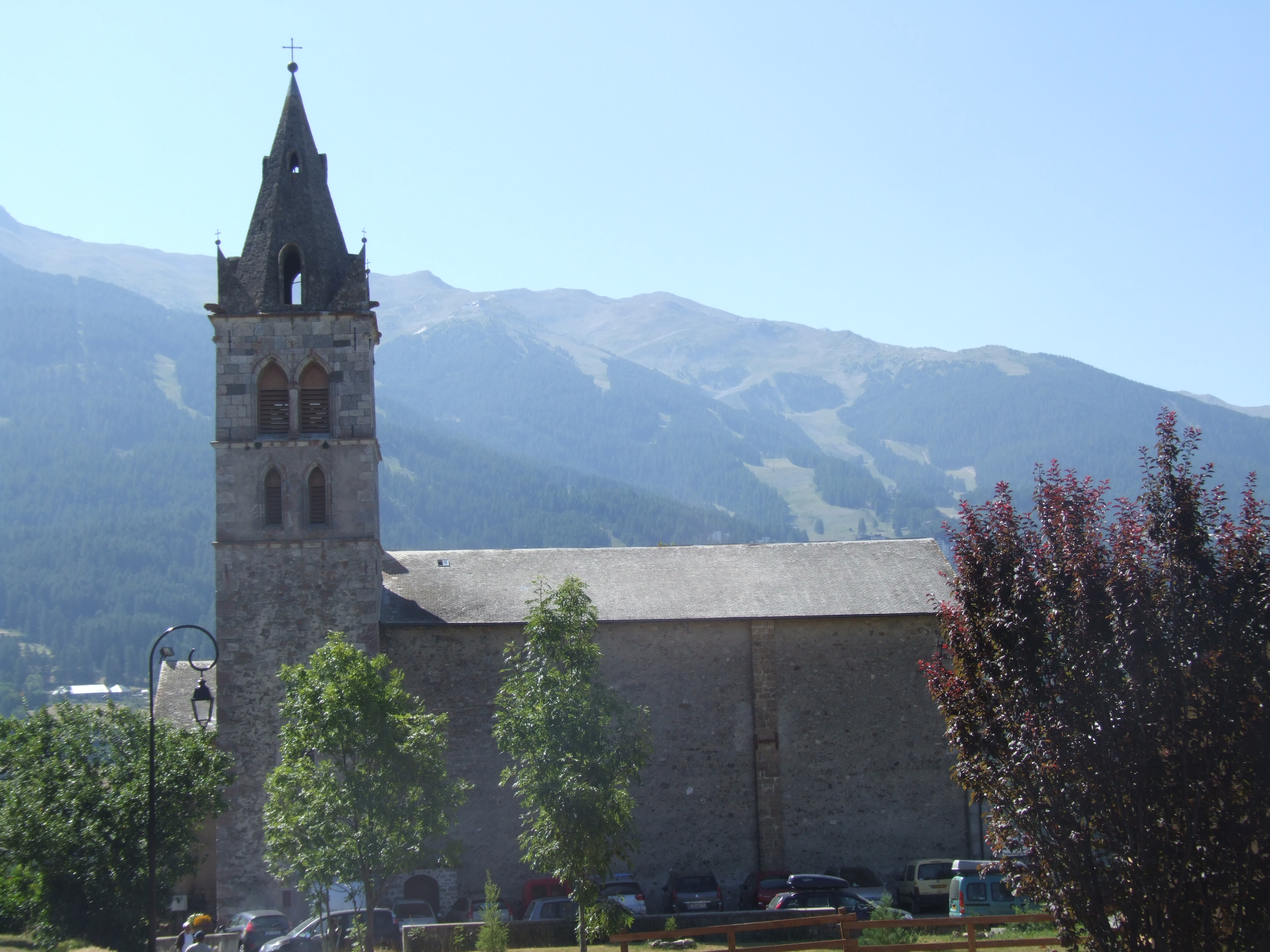 Église de la commune des Orres (Hautes-Alpes ; France).